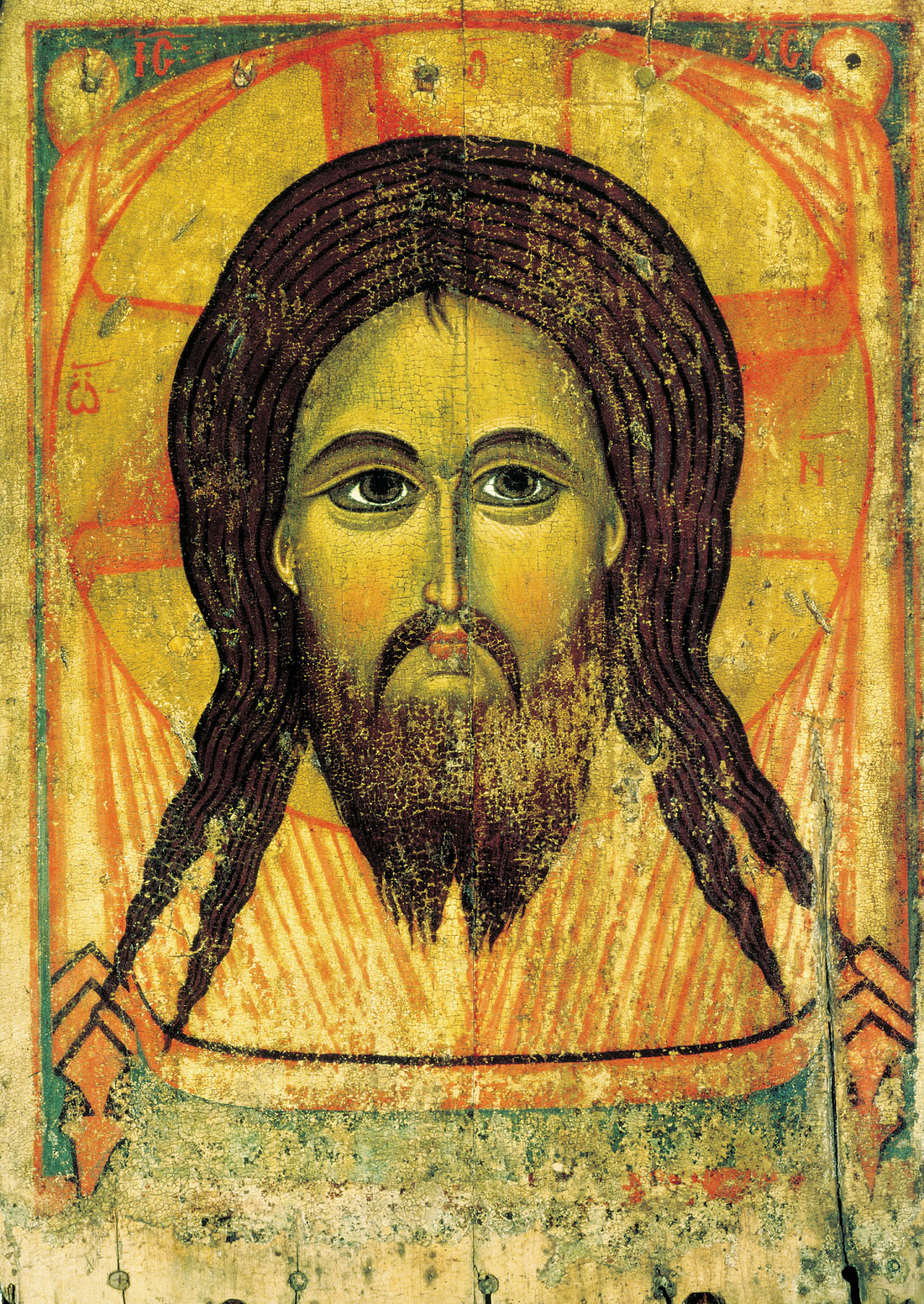 Спас Нерукотворный Школа или худ. центр: Ярославль Первая половина XIII в. 104 × 74 см Государственная Третьяковская Галерея, Москва, Россия Инв. 048138